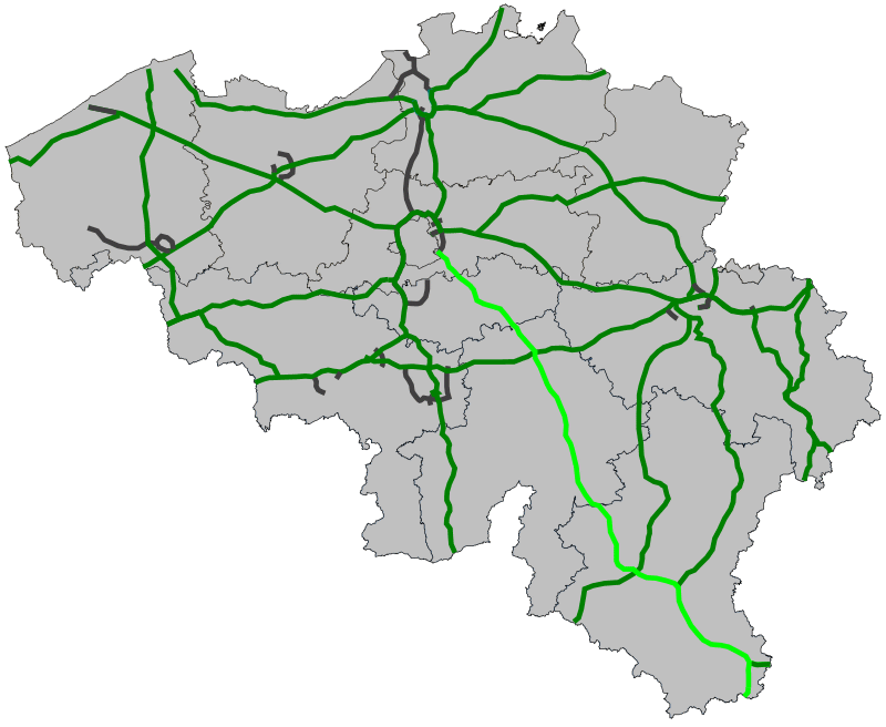 Traject Europese weg 411 in België